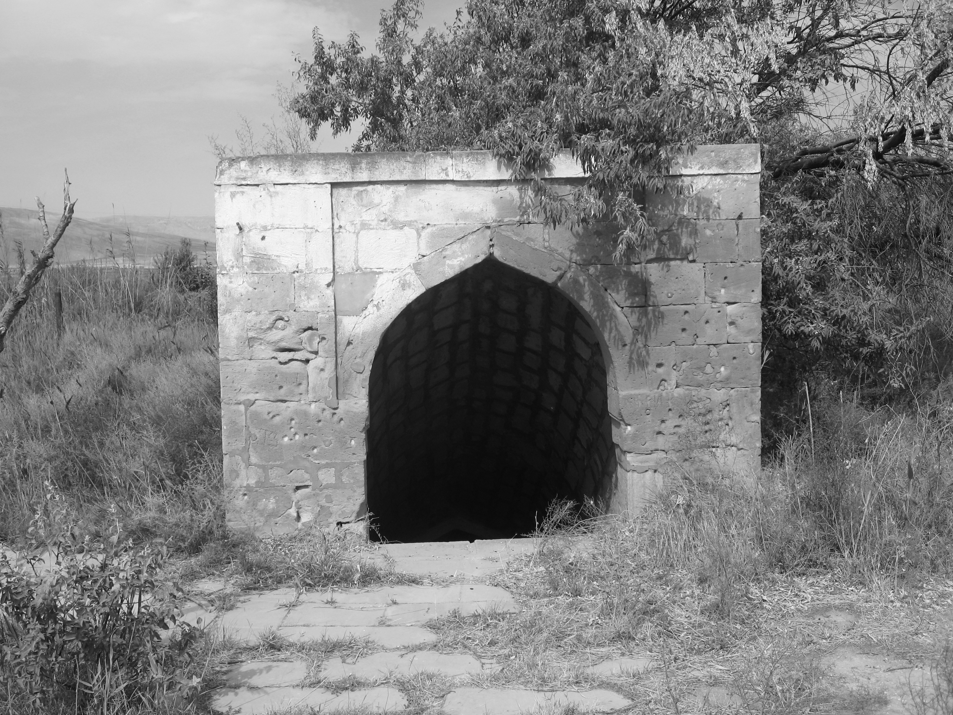 2-ой овдан Сангачальского караван-сарая